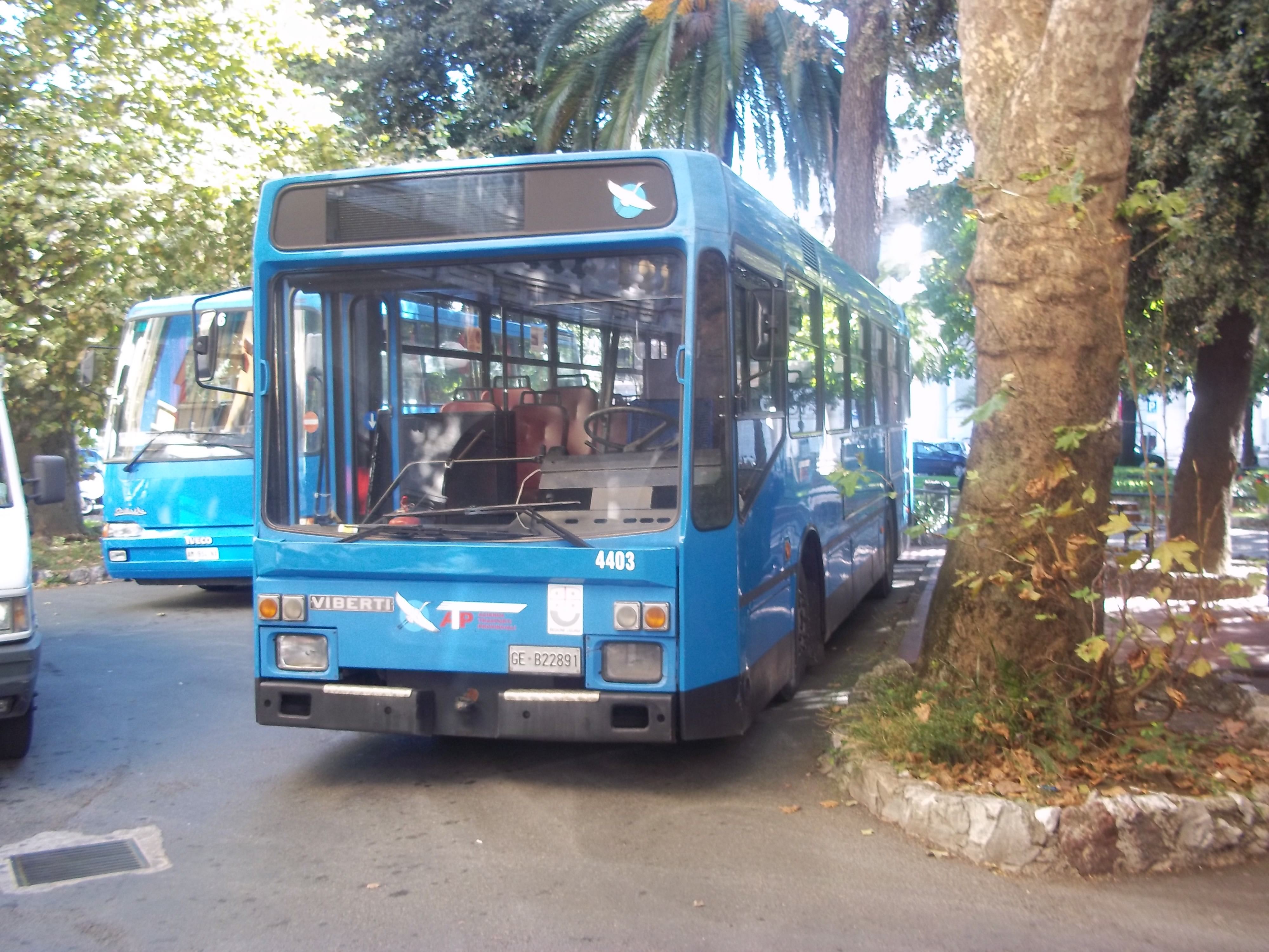 Iveco 671.10 della ATP Genova